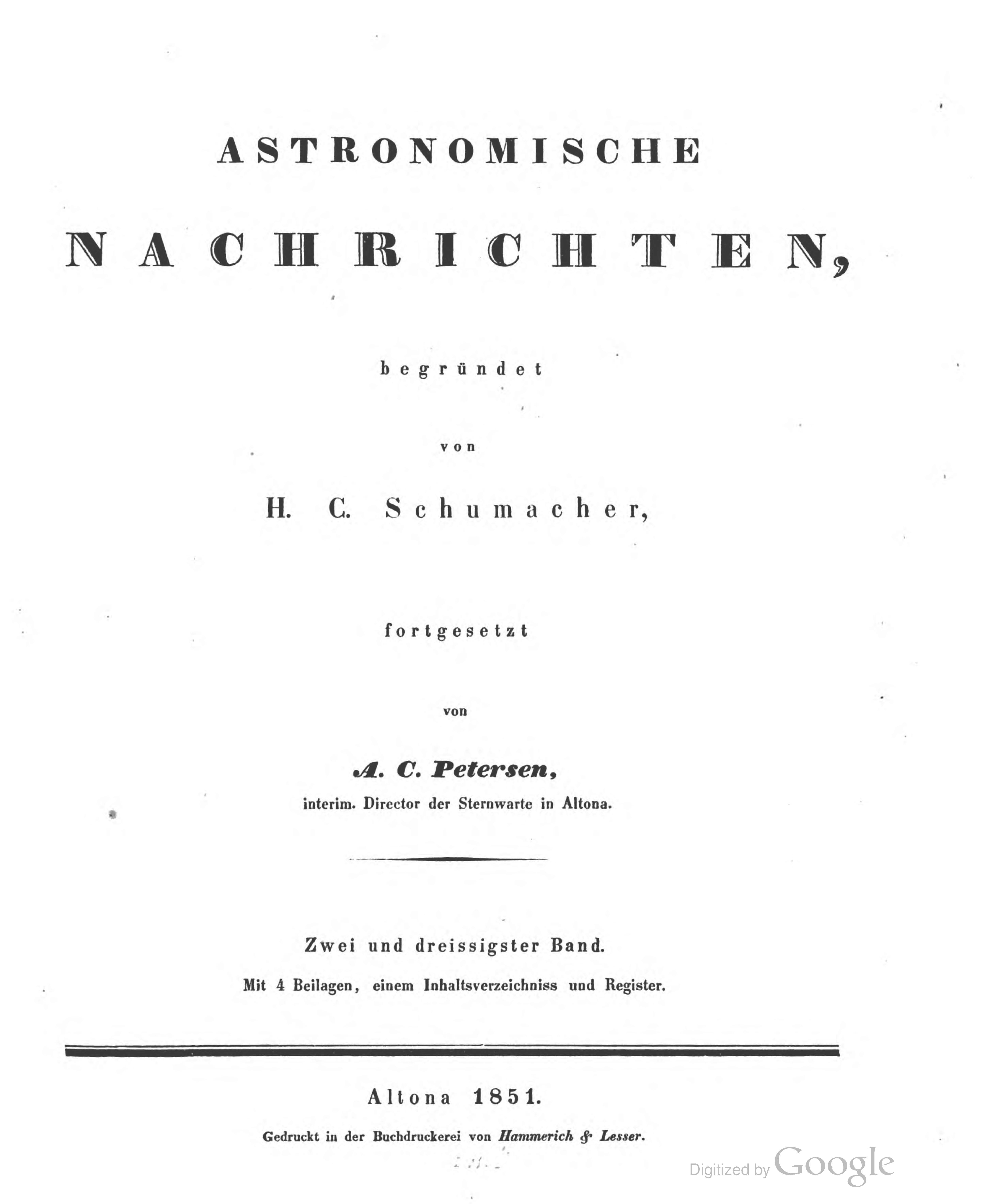 Astronomische Nachrichten, Band 32, 1851, Titelblatt.